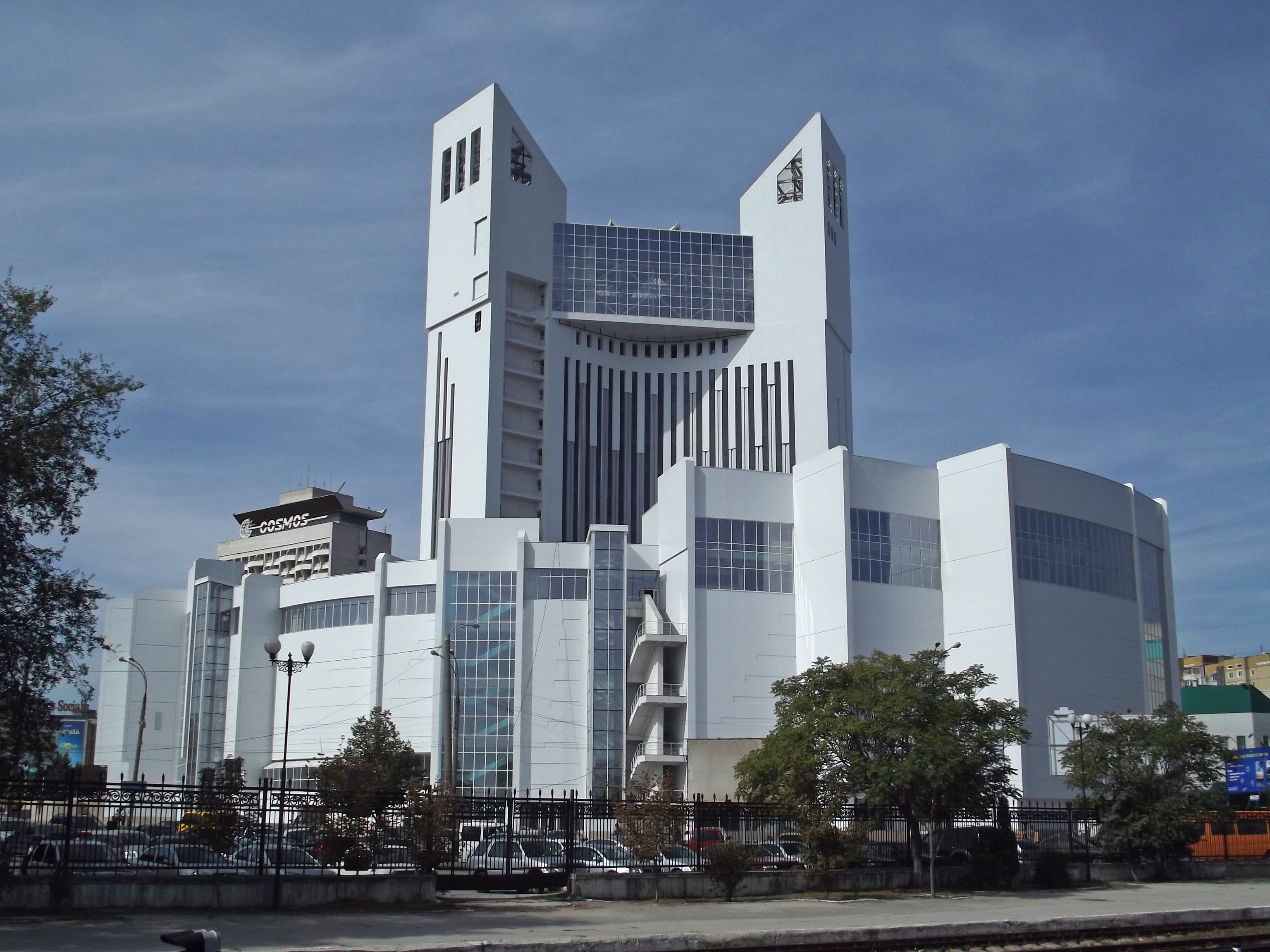 ТЦ "Атриум"